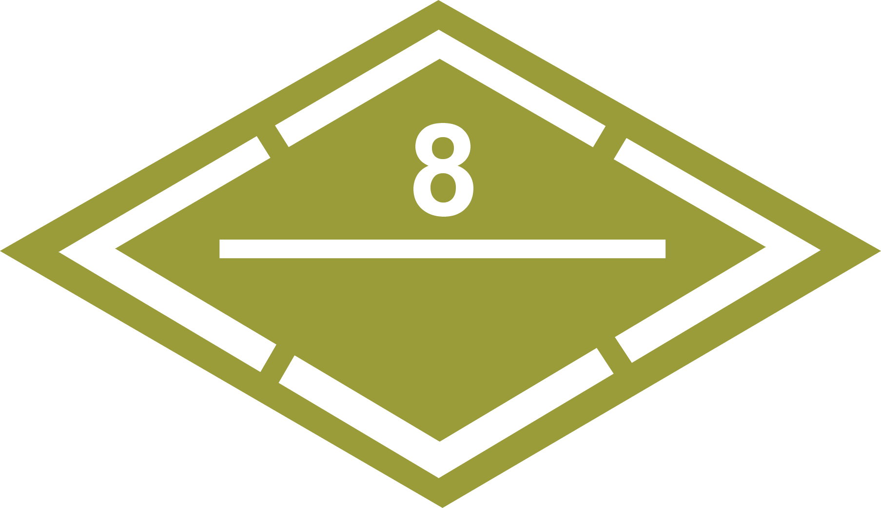 Znak na pojazdach 5 Batalionu Remontowego (5 DPanc